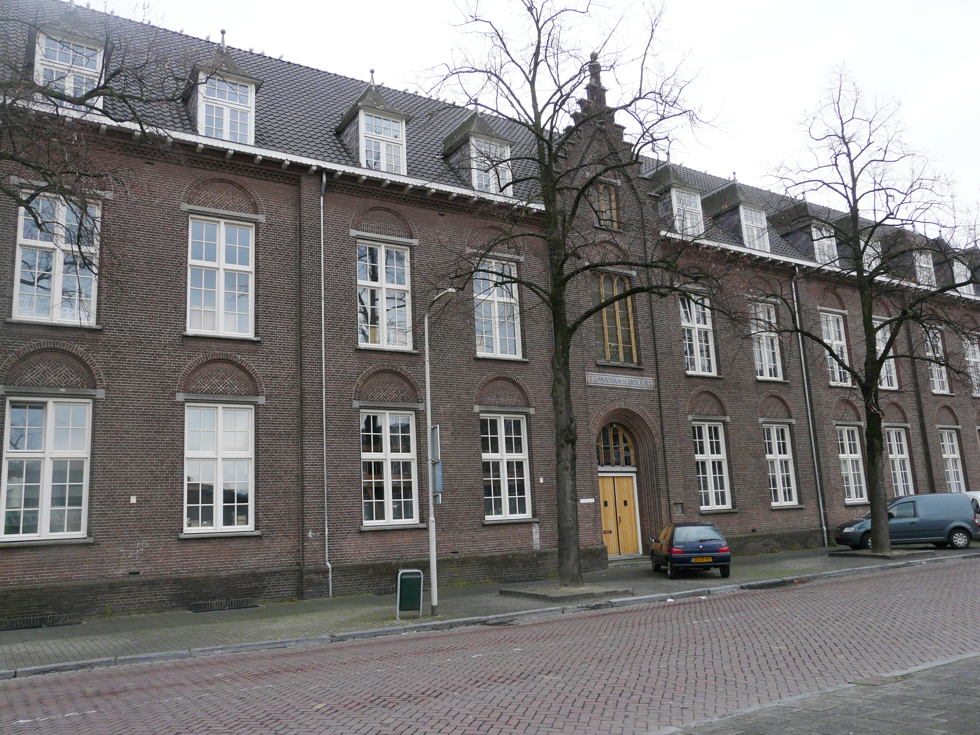 Zicht op een deel van de voormalige St. Annaschool gevestigd in de Oranjeboomstraat gelegen in de wijk Haagpoort in Breda. Niet ver van de Haagweg.